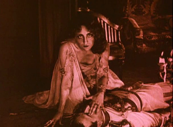 Description